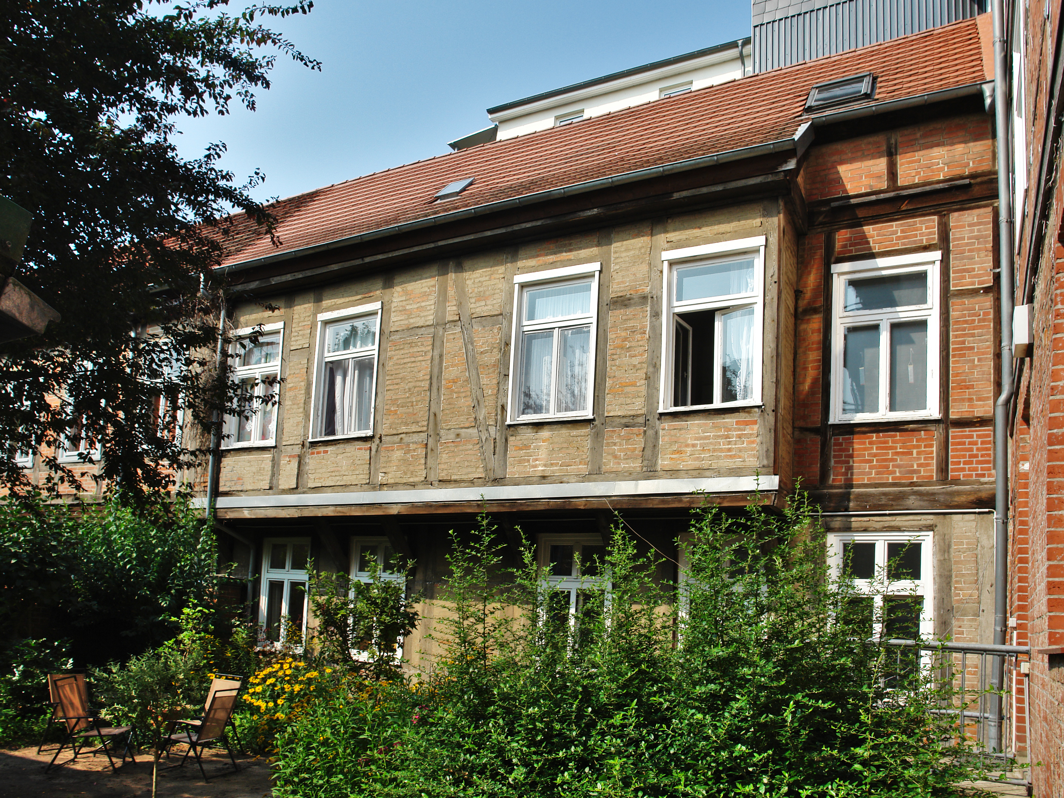 Bergstraße 29, 19055 Schwerin, Innenhof, nördlicher Seitenflügel